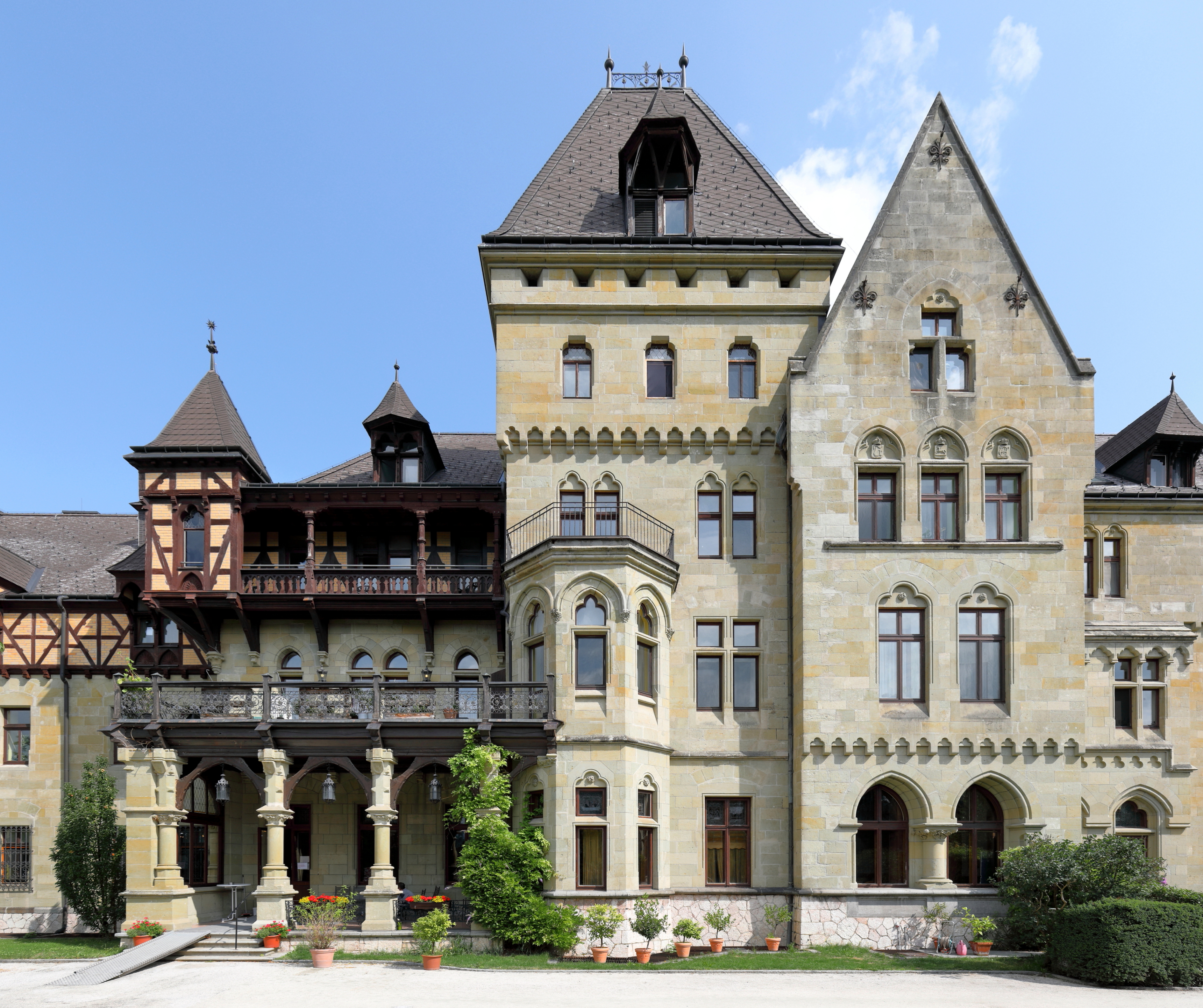 Die südseitige Hauptfassade des Schlosses Cumberland in der oberösterreichischen Stadt Gmunden. Das Schlossanlage wurde im Auftrag von Ernst August, Kronprinz von Hannover und 3. Duke of Cumberland, nach Plänen des Hannoveraner Architekten Ferdinand Schorbach im neugotischen Tudorstil von 1882 bis 1886 errichtet.